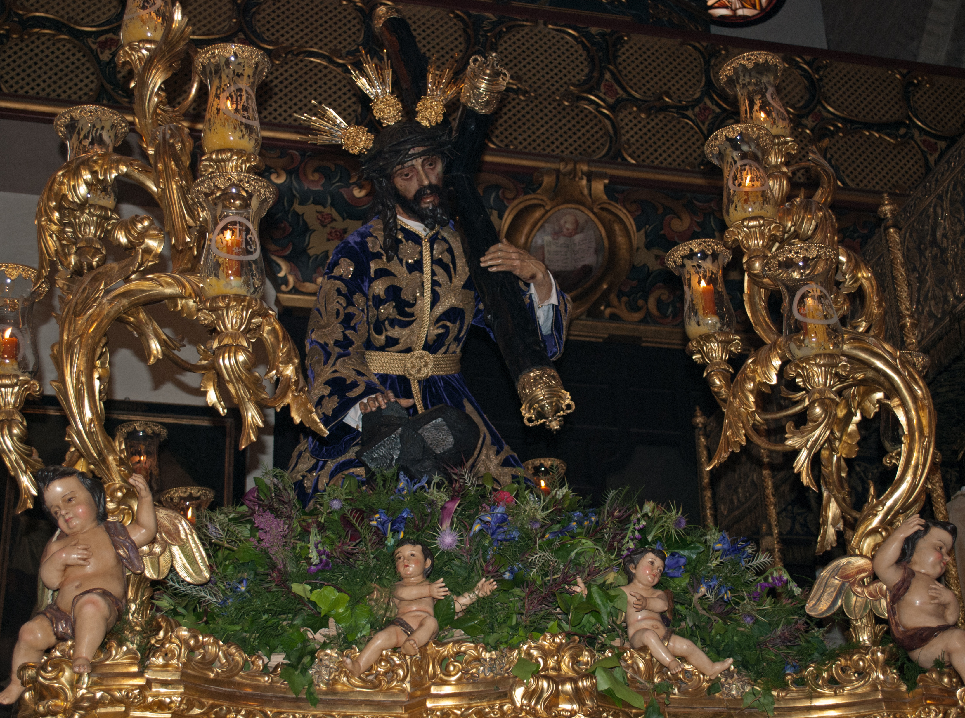 Imagen y paso de Jesús de las tres caidas. Hermandad de San Isidoro. Semana Santa de Sevilla.